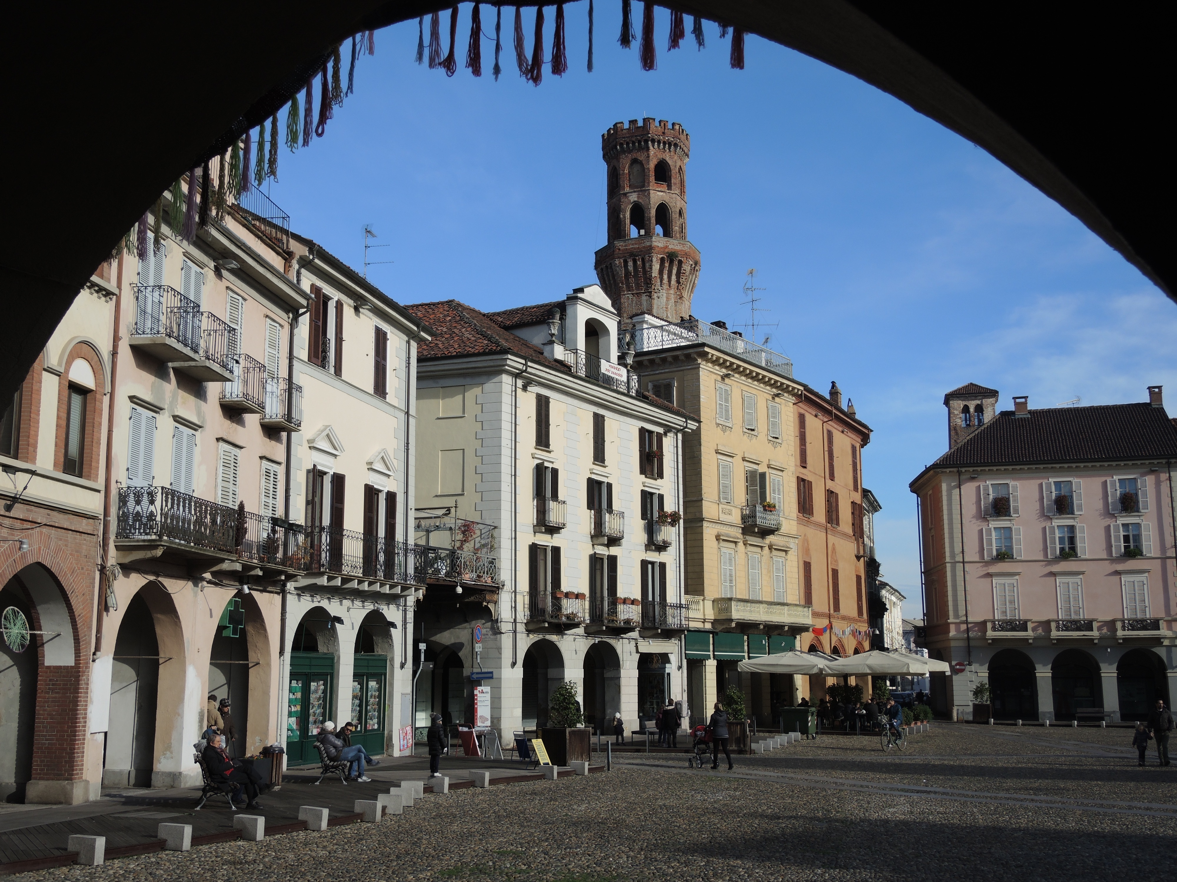 Piazza Cavour con Torre dell'Angelo (Vercelli)